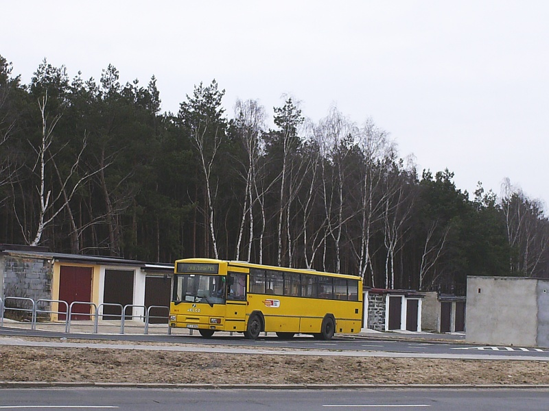 Autobus komunikacji miejskiej w Lubinie, 2007 r.